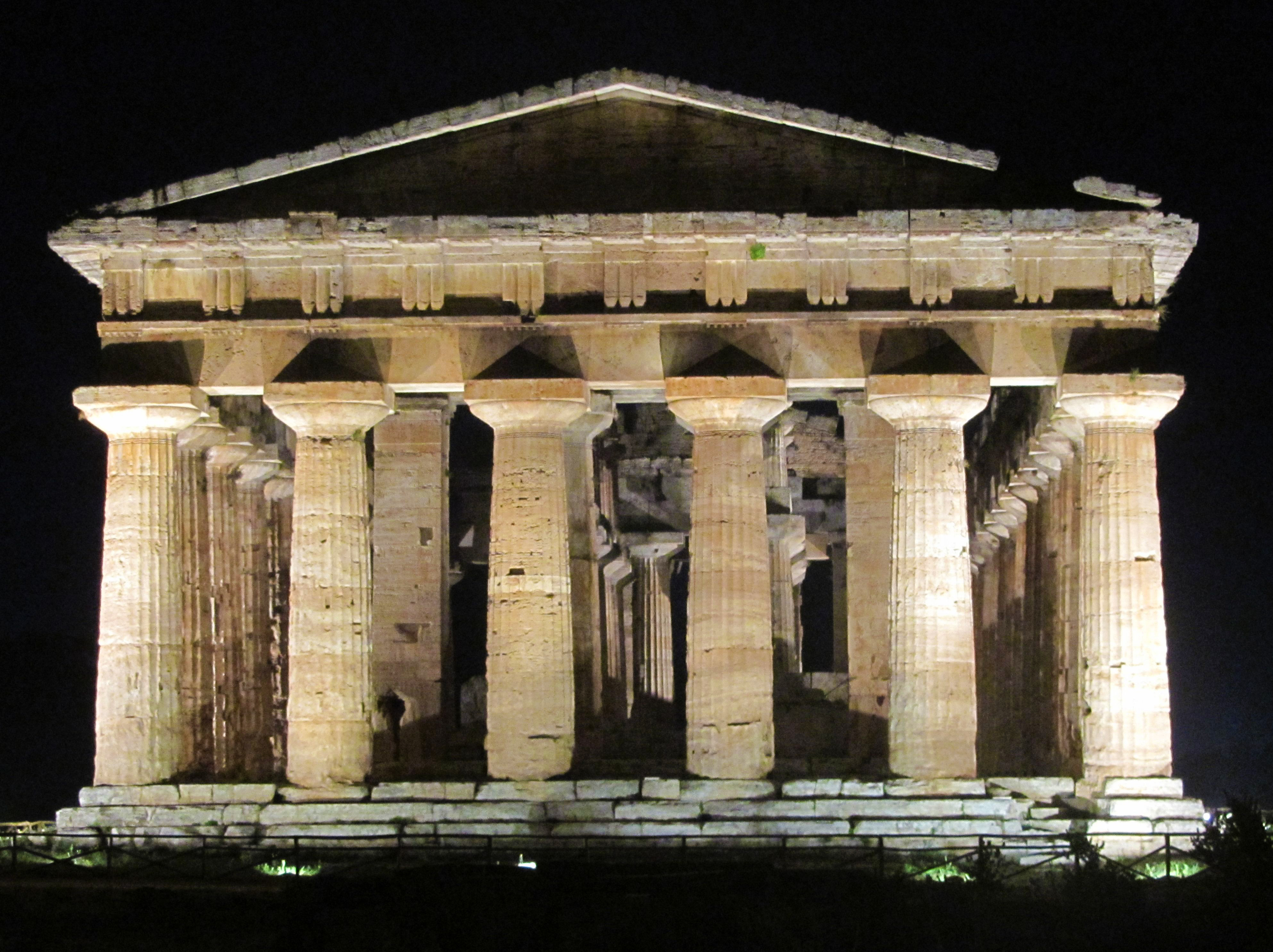 Area Archeologica di Paestum - MIBAC tempio di Nettuno This is a photo of a monument which is part of cultural heritage of Italy.